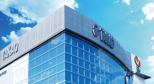 株式会社 高尾